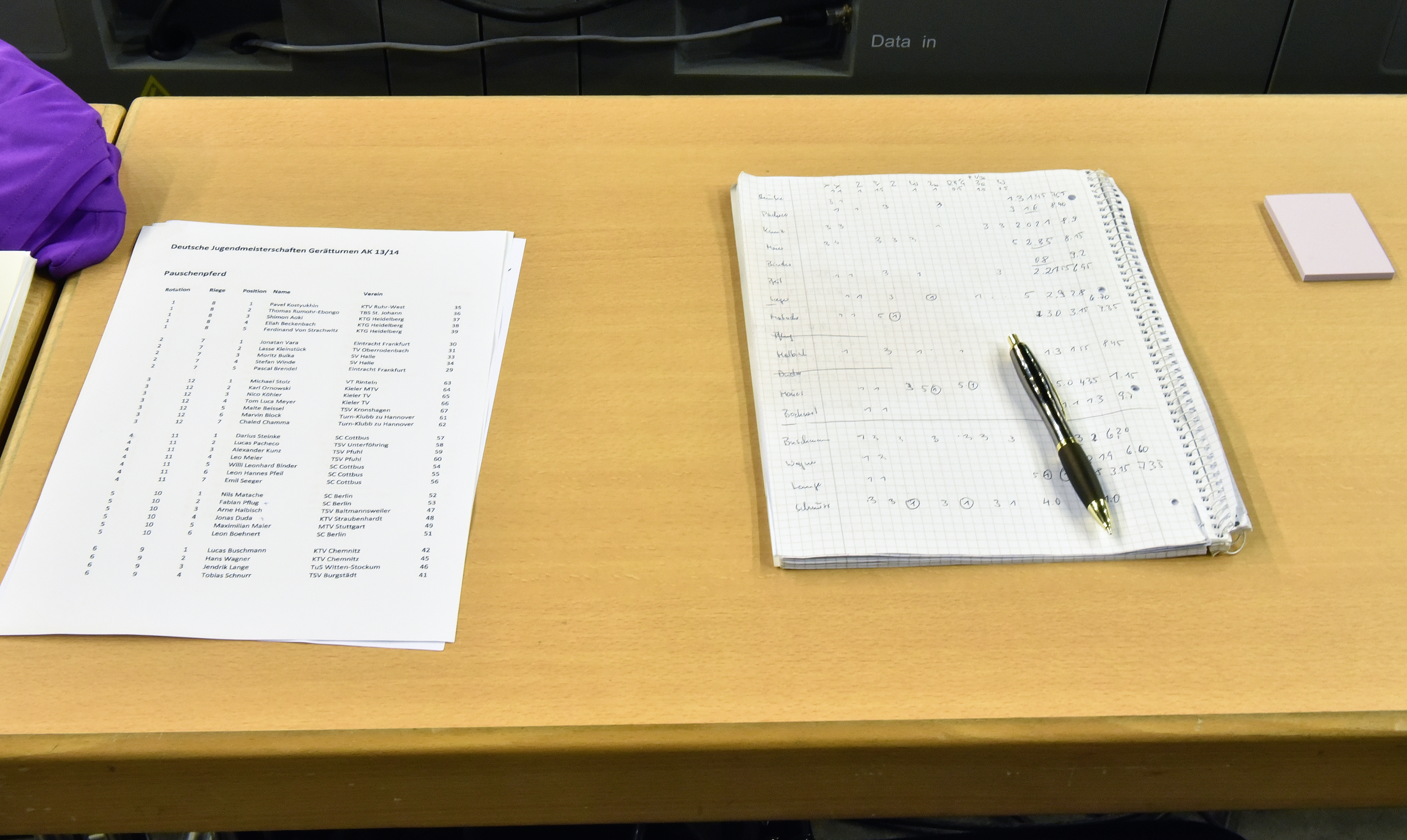 Deutsche Jugendmeisterschaften Gerätturnen männlich AK 13/14 Pflicht beim Internationalen Deutschen Turnfest Berlin 2017.